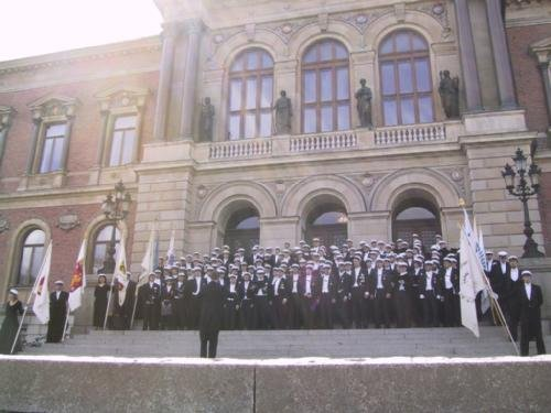 Kapriskören på universitetstrappan den 10 maj 2003. Manskörfestivalen Kapris 2003.